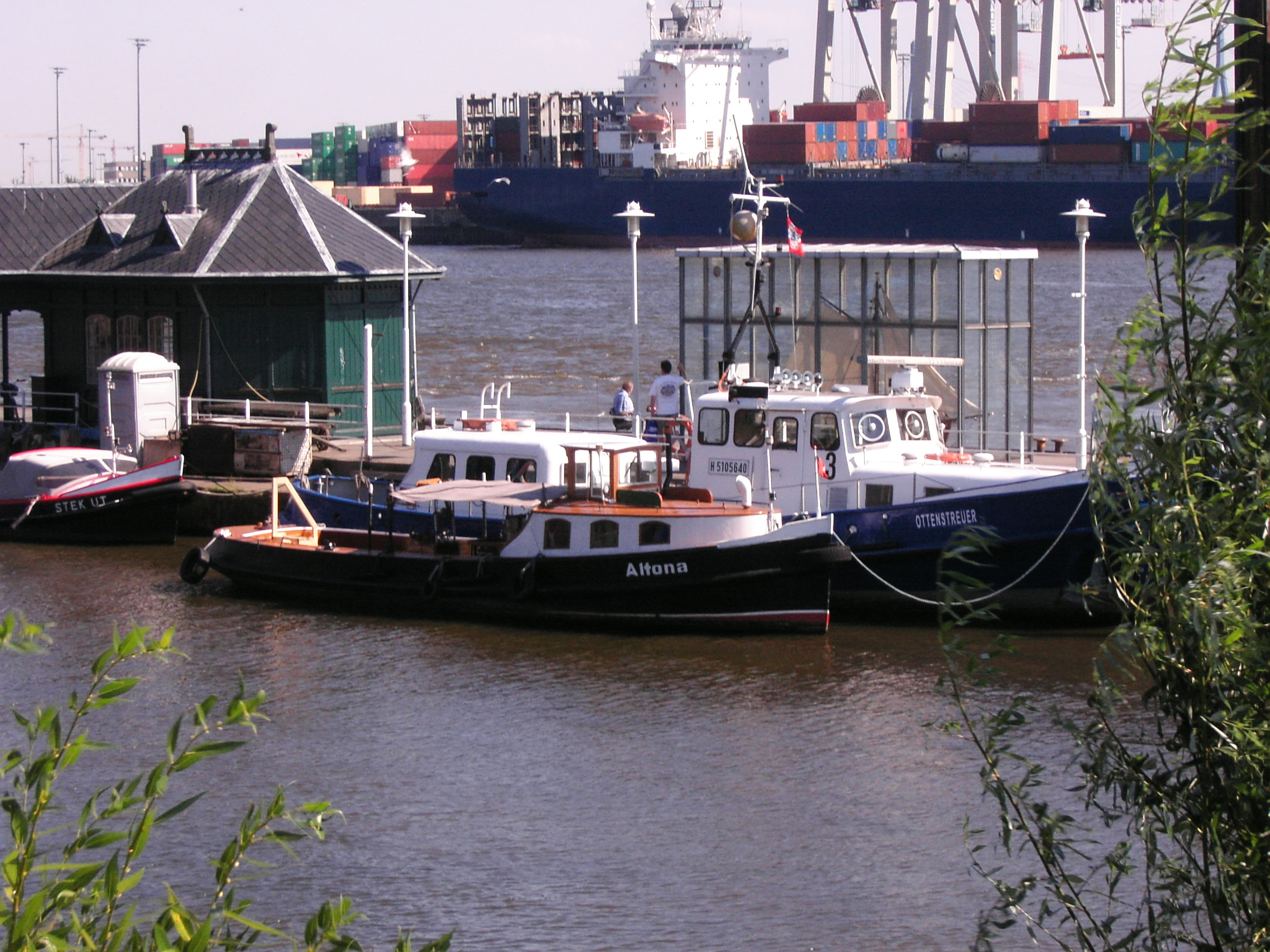 Barkasse und Zollboot